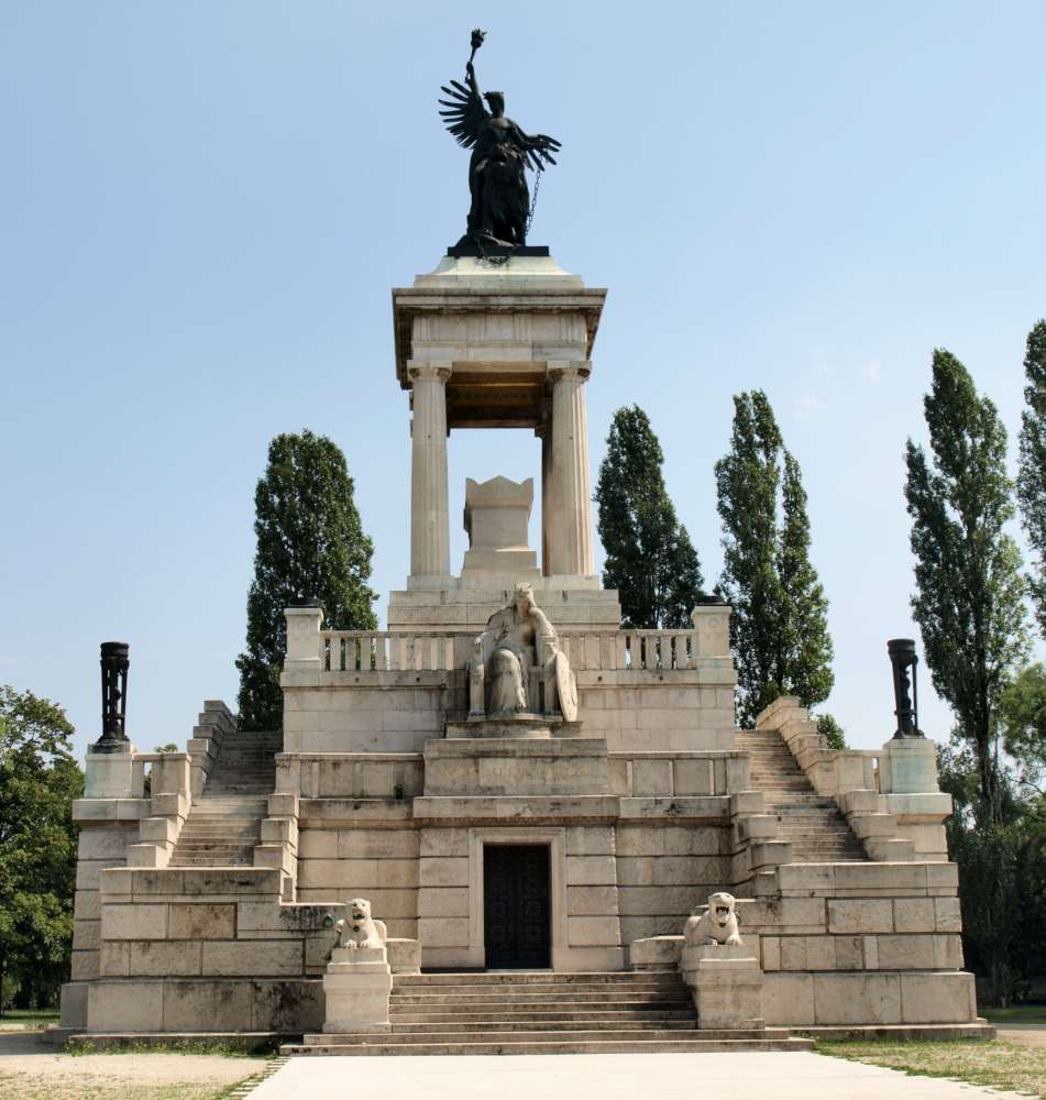 Kossuth Lajos emlékműve (Budapest, VIII. ker., Fiumei úti temető)